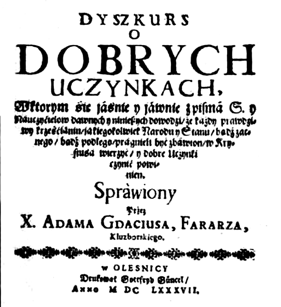 Adam Gdacjusz "Dyszkurs o dobrych uczynkach" Oleśnica 1687.